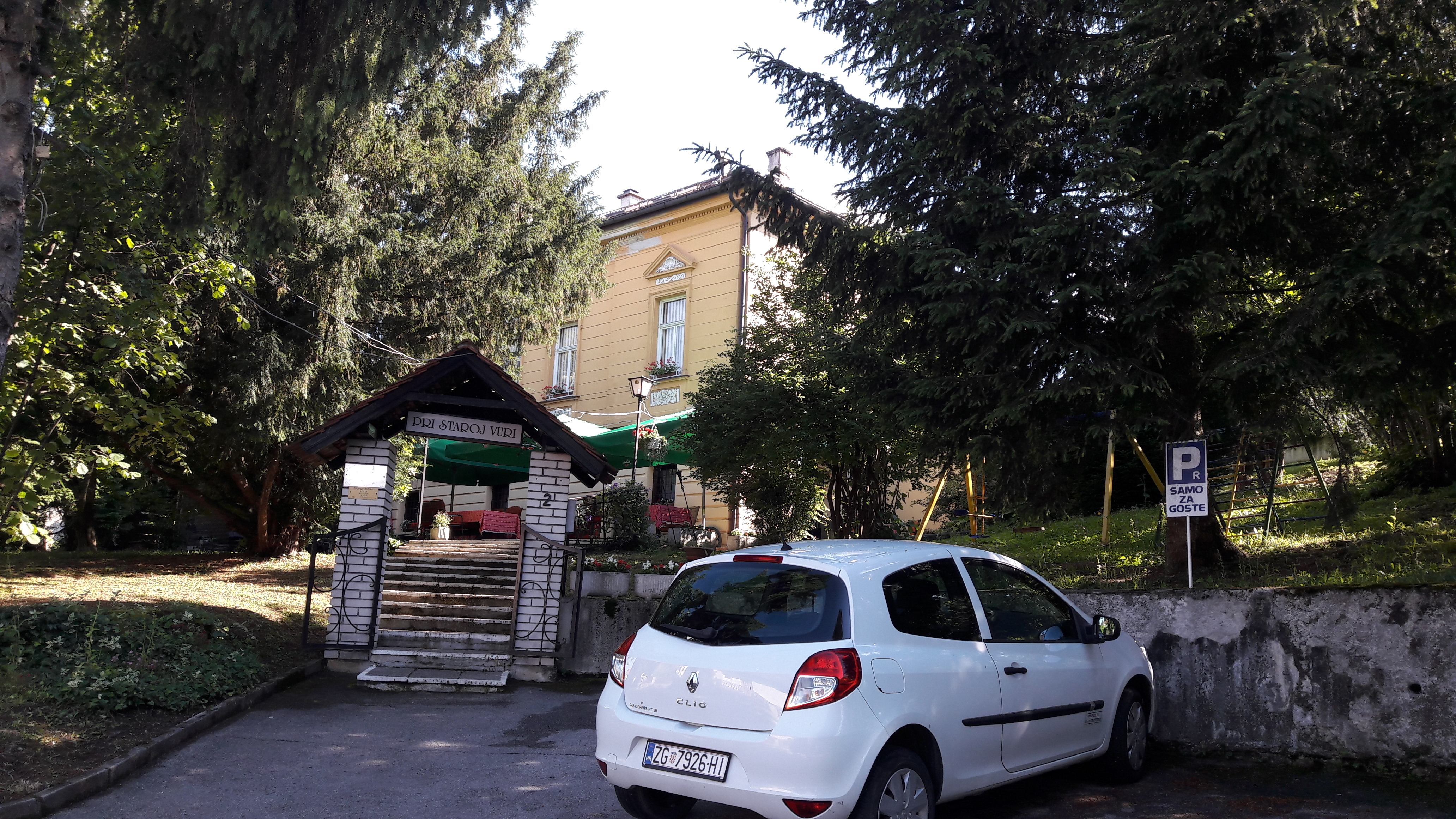 Vila Šojka danas restoran "Pri staroj vuri"